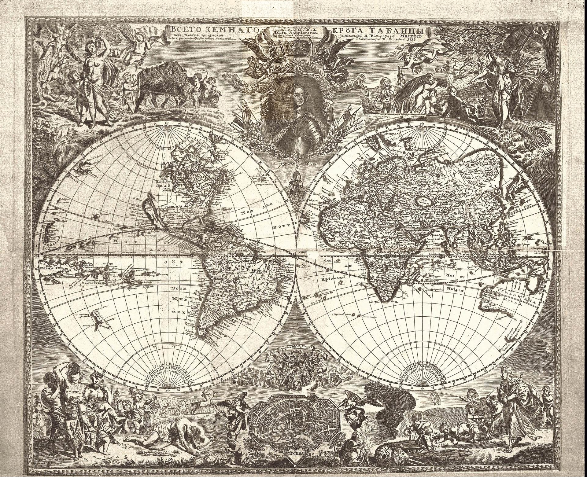 Карта полушарий 1713 года, издана в Гражданской типографии В.О. Киприянова Масштаб: [1:74 000 000]